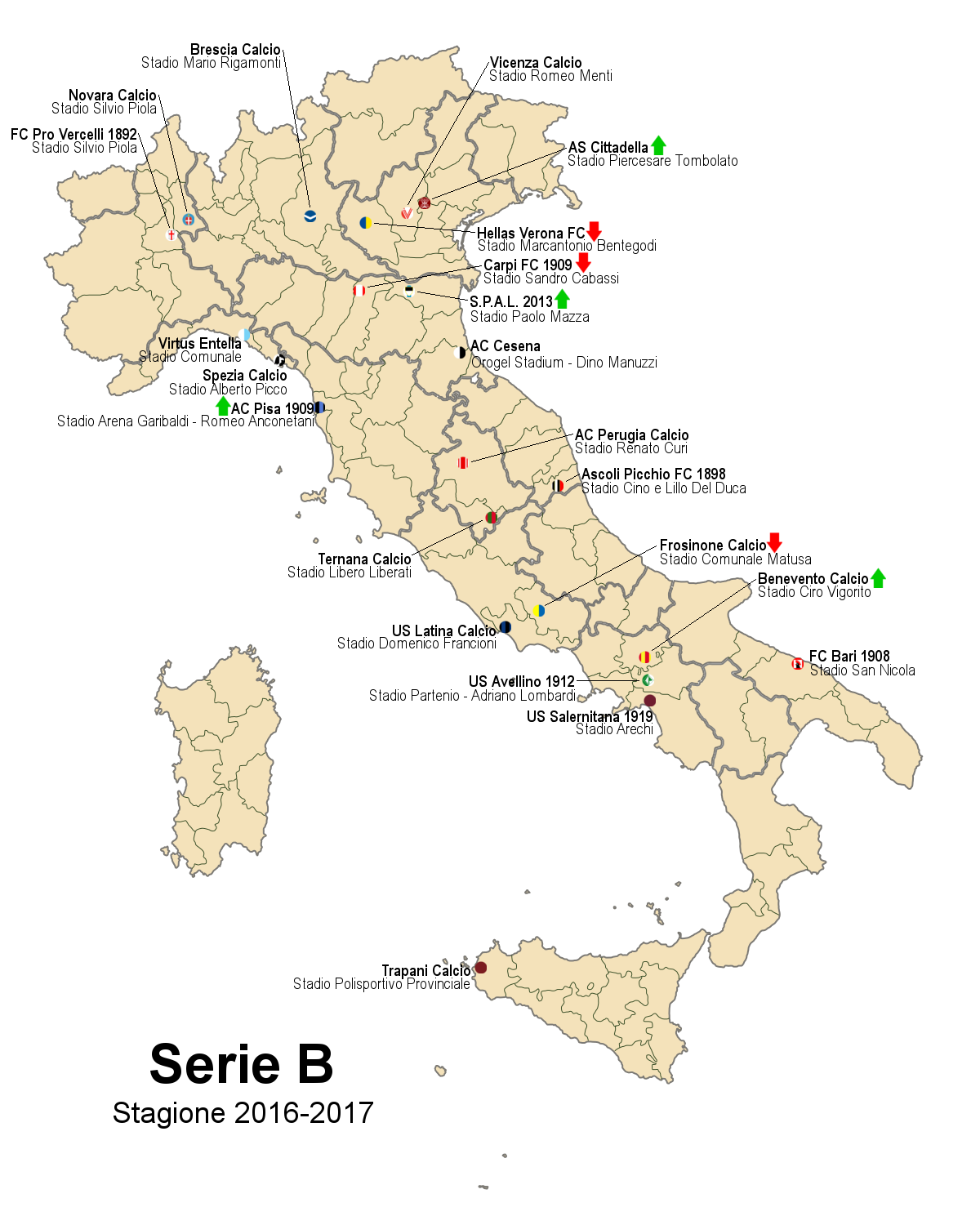 Ubicazione delle squadre della Serie B 2016-2017